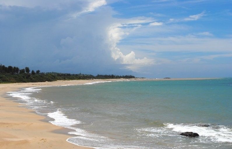 Playa La Marina de Hatillo, Puerto Rico